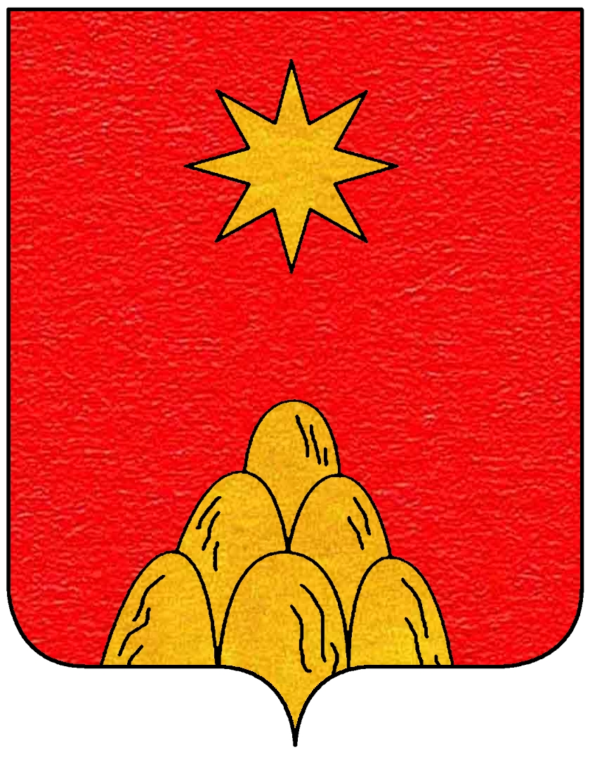 Stemma della famiglia Chigi